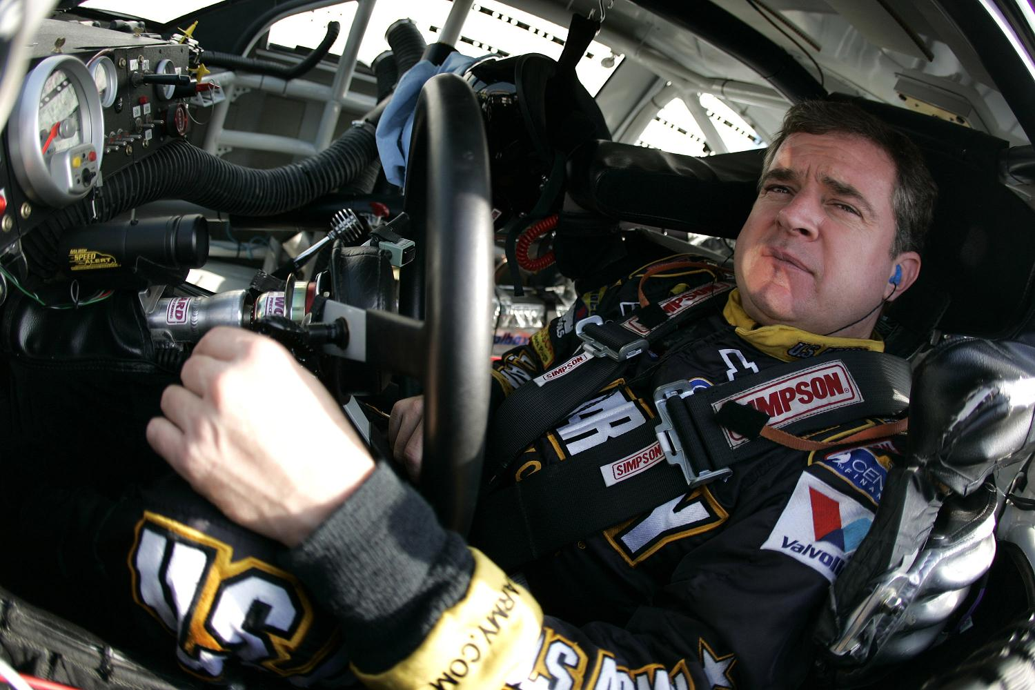 NASCAR driver Joe Nemechek